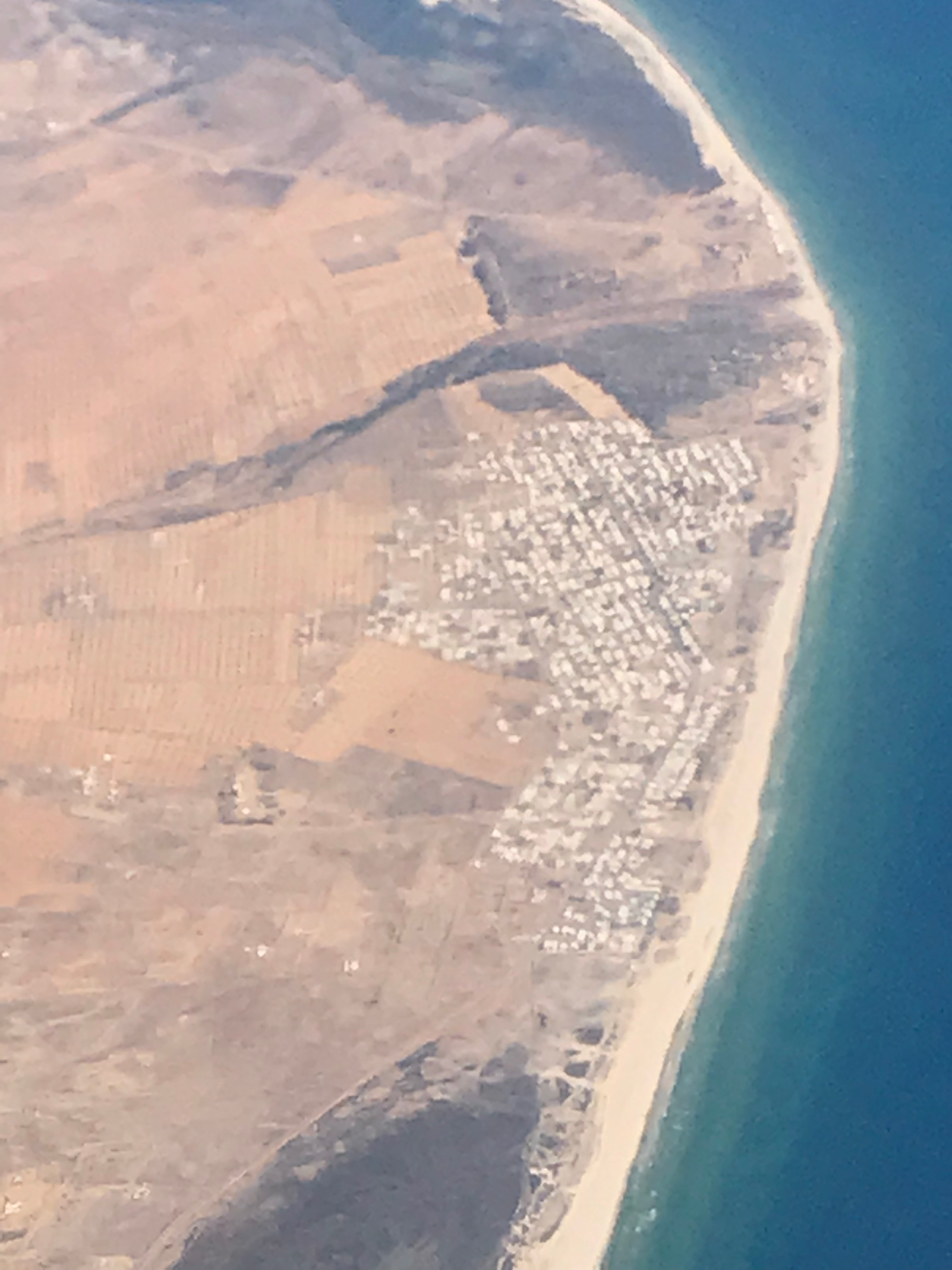 Aerial view of Chaffar (Sfax Governorate).